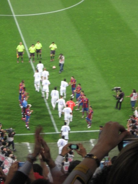 Pasillo del F.C. Barcelona al Real Madrid en la temporada 2007-2008 (foto desde la tribuna del Bernabeu)